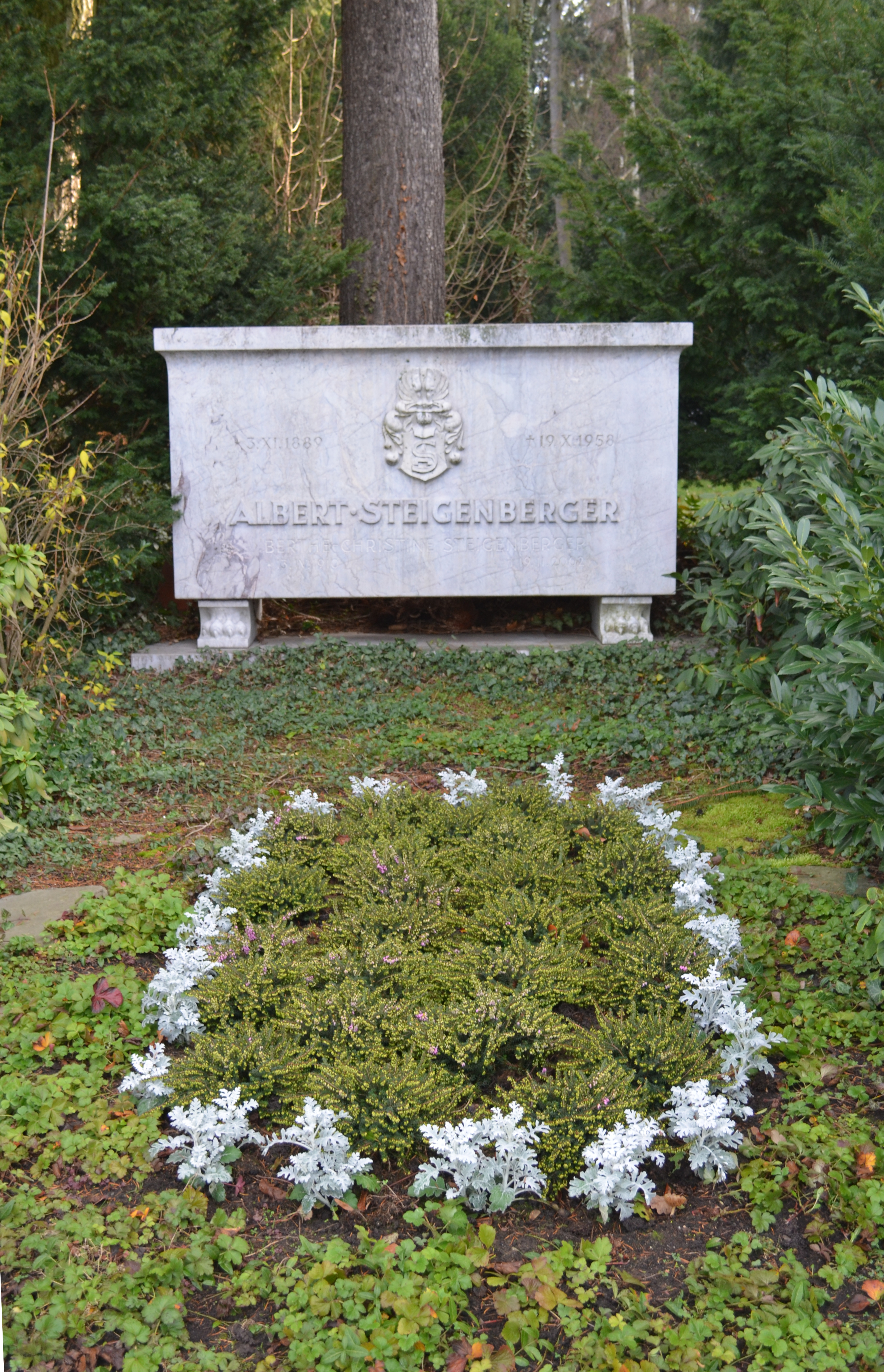 Frankfurt, Hauptfriedhof, Grab, IV 125 Albert Steigenberger